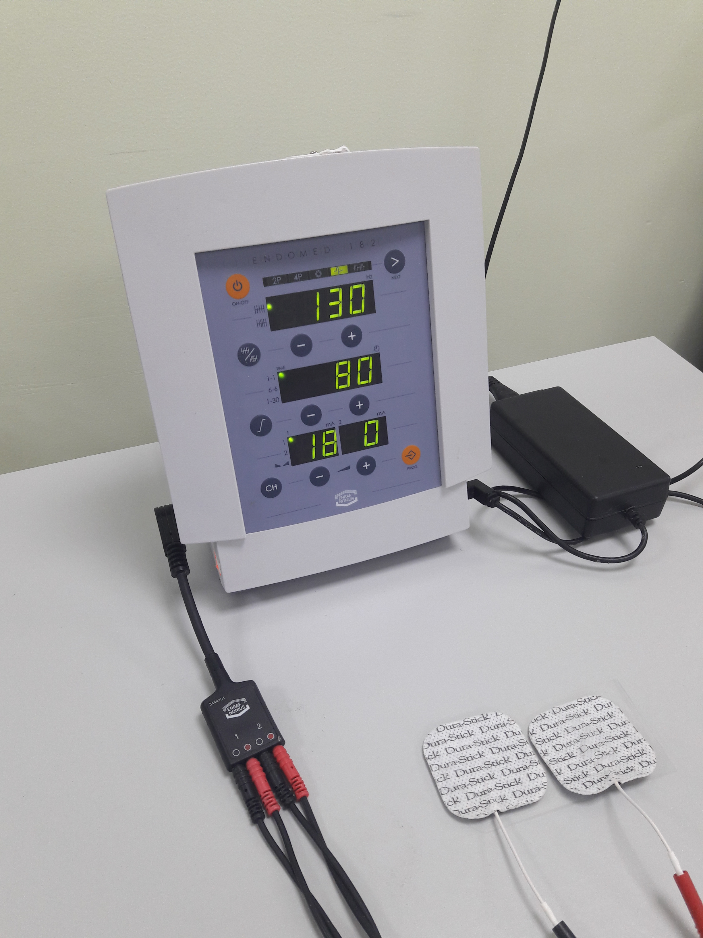 Electroterapia